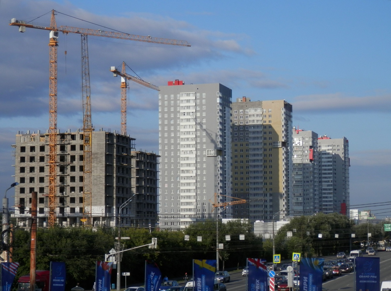 Манхеттен строительство